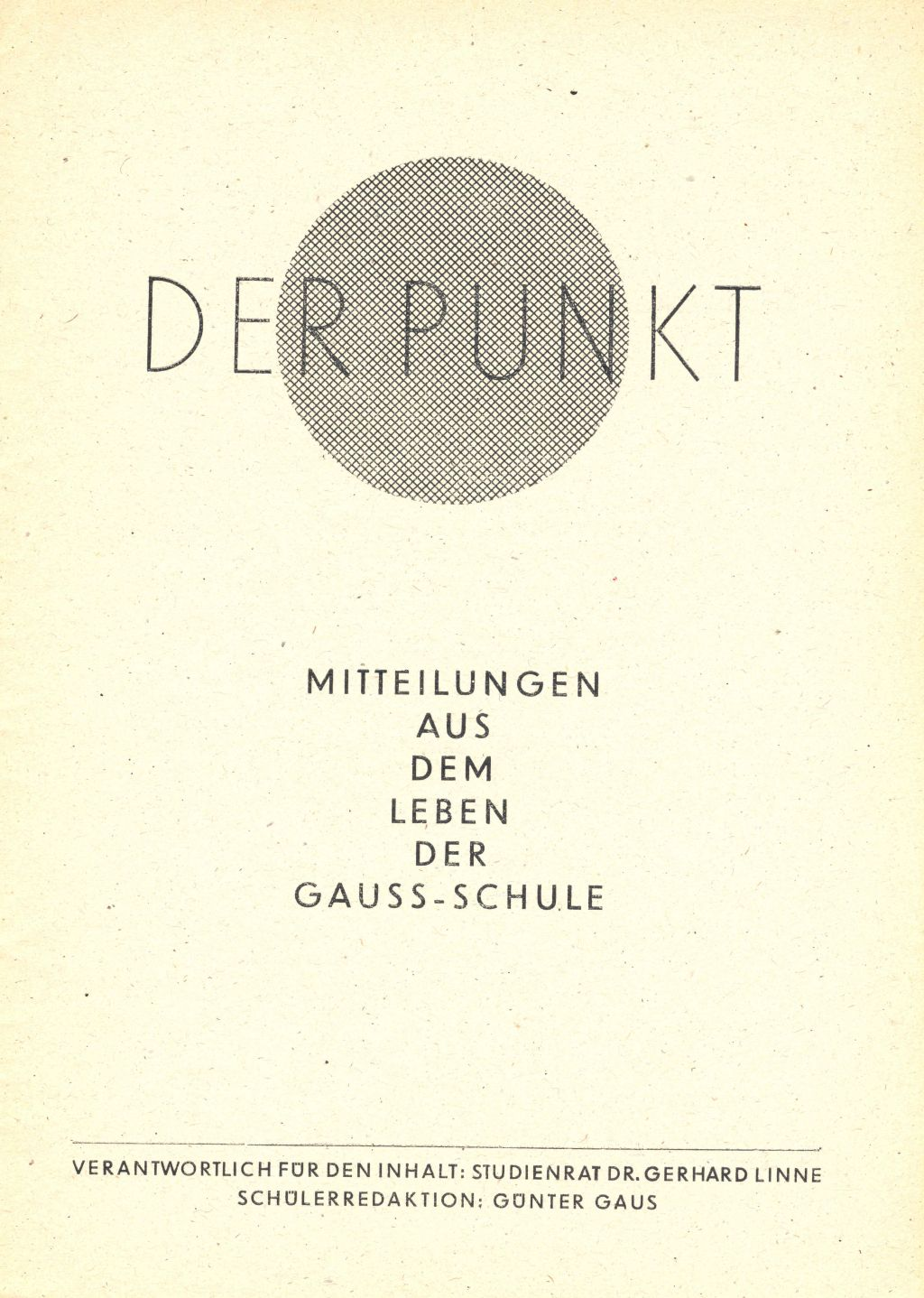 Braunschweig: Schülerzeitung Der Punkt (Innenseite) der Gaußschule – Gymnasium am Löwenwall.